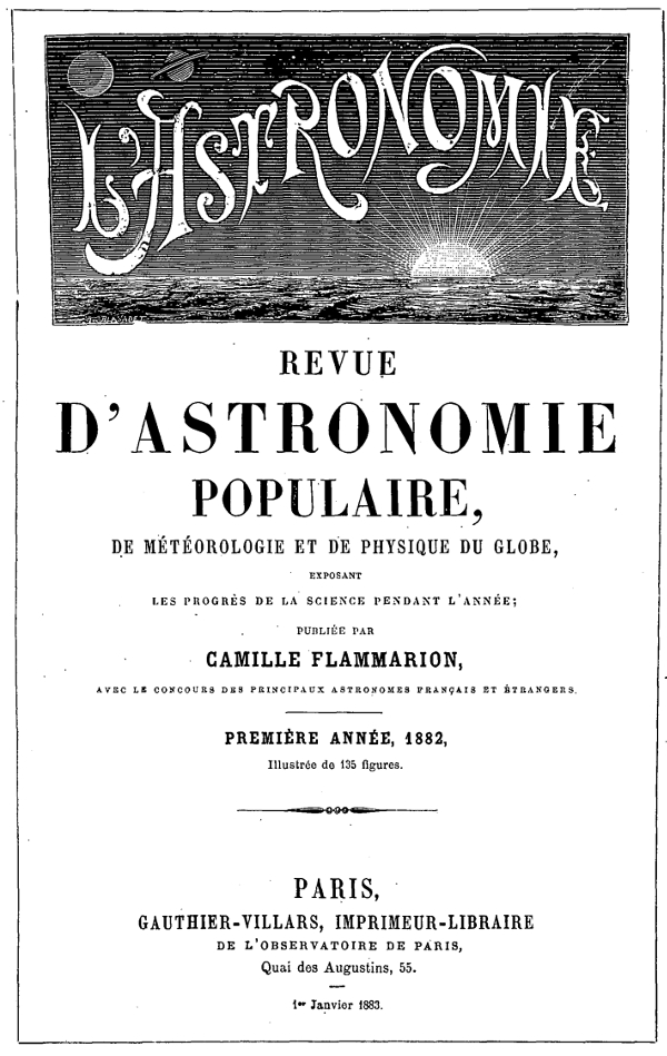 Cover of first issue of L'Astronomie magazine (Paris, 1882)